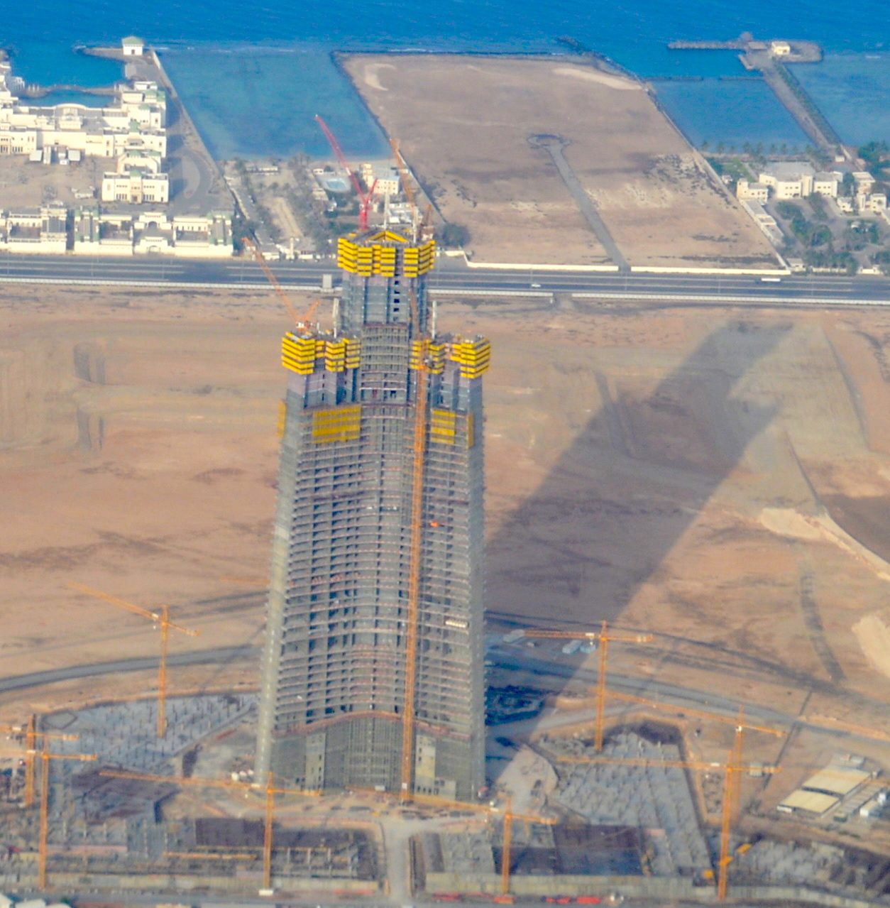 La torre de Jedda en Junio de 2017.